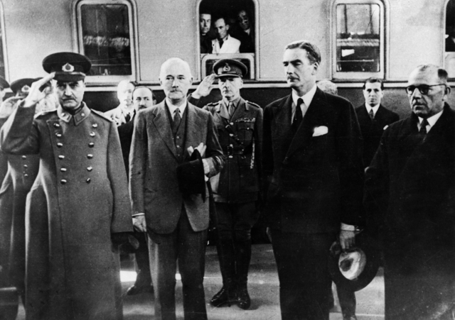 1941-04. MR. EDEN'S VISIT TO TURKEY, SHOWING HIS ARRIVAL AT ANKARA STATION. MR. EDEN WITH SIR H. KNATCHBULL-HUGESSEN, BRITISH AMBASSADOR TO TURKEY, M. SHUKRU SARADJOGLU (TURKISH MINISTER FOR FOREIGN AFFAIRS) AND GENERAL ASIM GUN DUZ (DEPUTY-CHIEF OF THE TURKISH GENERAL STAFF).